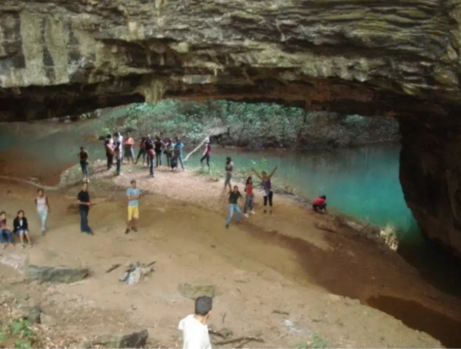 Canyon da antiga usina que absteceu a cidade de Mirabela MG.